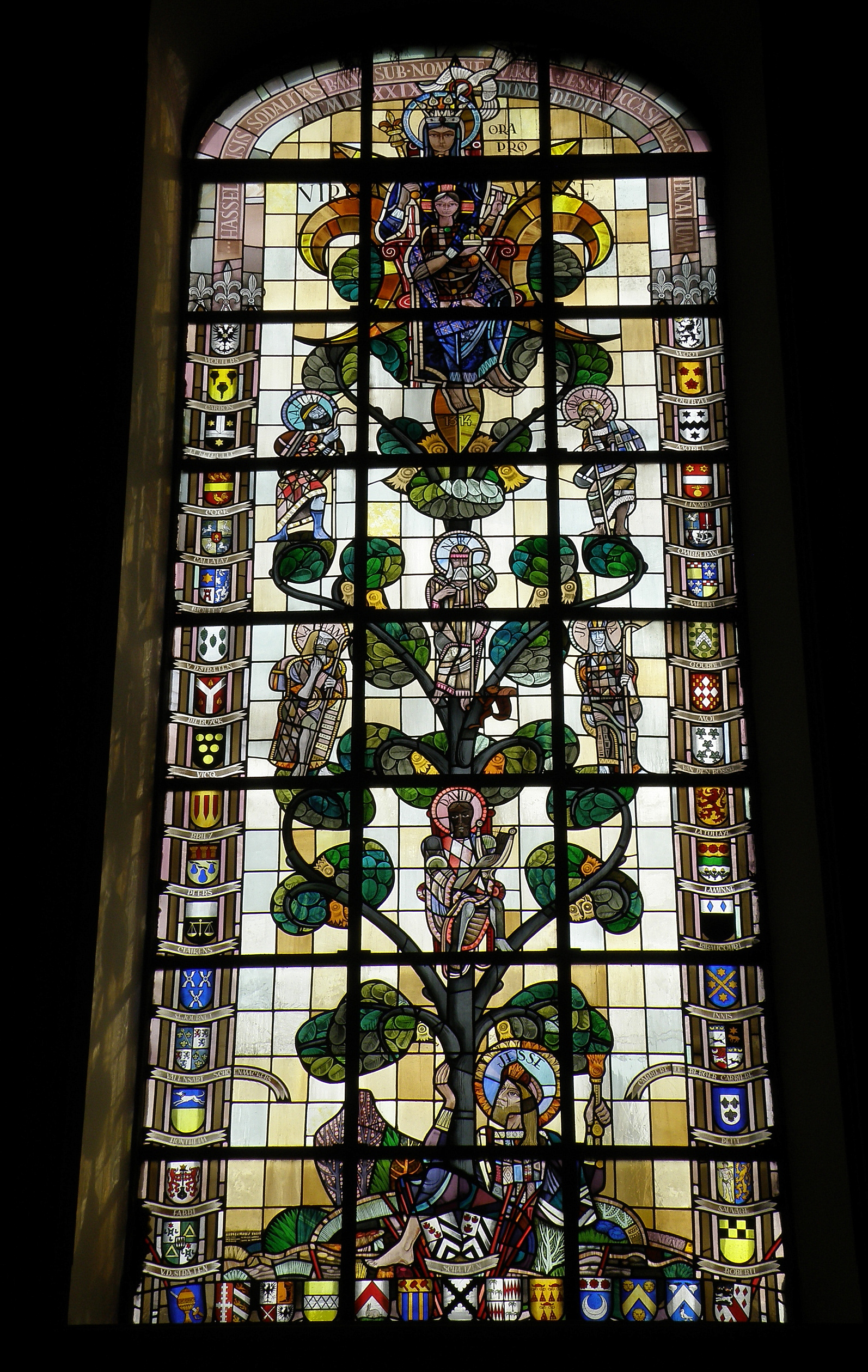 Hasselt (prov. Limburg, België). Virga Jessebasiliek, Kapelstraat.